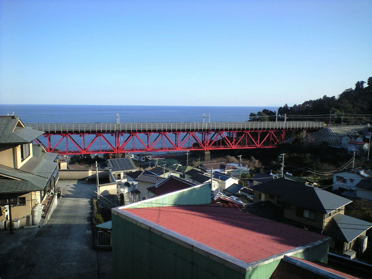 神奈川県小田原市根府川、JR東日本東海道本線、白糸川橋梁、1924年（大正13年）